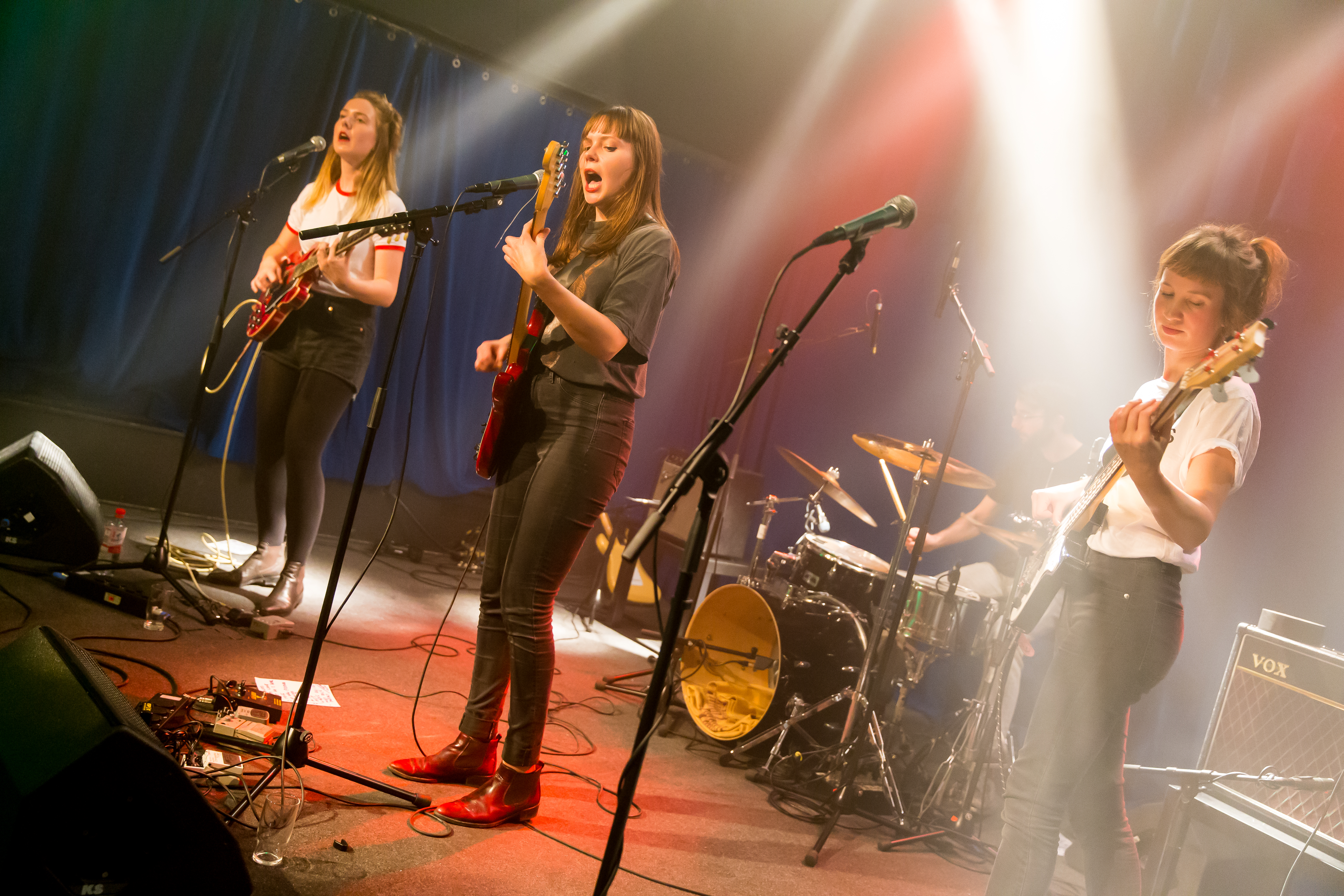 Gurr during Gurr at dasHaus, Ludwigshafen am Rhein, Rheinland Pfalz, Germany on 2016-11-23, Photo: Sven Mandel